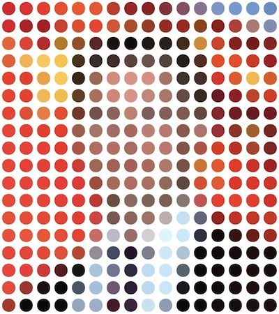 Krister Blomberg